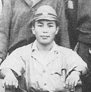 343空、分隊長・大尉時代の山田良市。